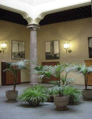 Patio renacentista